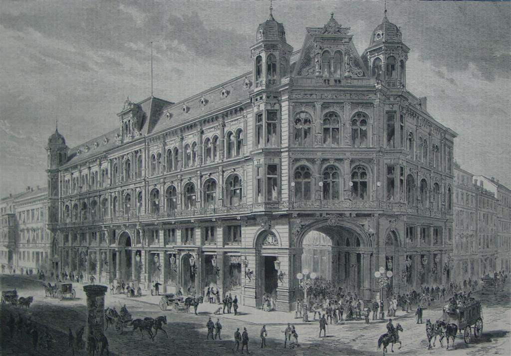 Kaisergalerie, Nordwestliche Ecke Friedrichstraße / Behrenstraße. Der Komplex umfasste die Grundstücke Unter den Linden 22-23, Friedrichstraße 163-164 und Behrensstraße 51-53. Das Gebäude wurde im Krieg größtenteils zerstört, die Reste wurden 1957 abgetragen. Heute befindet hier das Hotel The Westin Grand. Es steht nicht nur auf dem Grundstück der damaligen Passage sondern auch auf den Grundstücken Ecke Unter den Linden / Friedrichstraße (ehem. Café Kranzler). Holzschnitt von ca. 1890 im Besitz von Dr. Albrecht Blank.